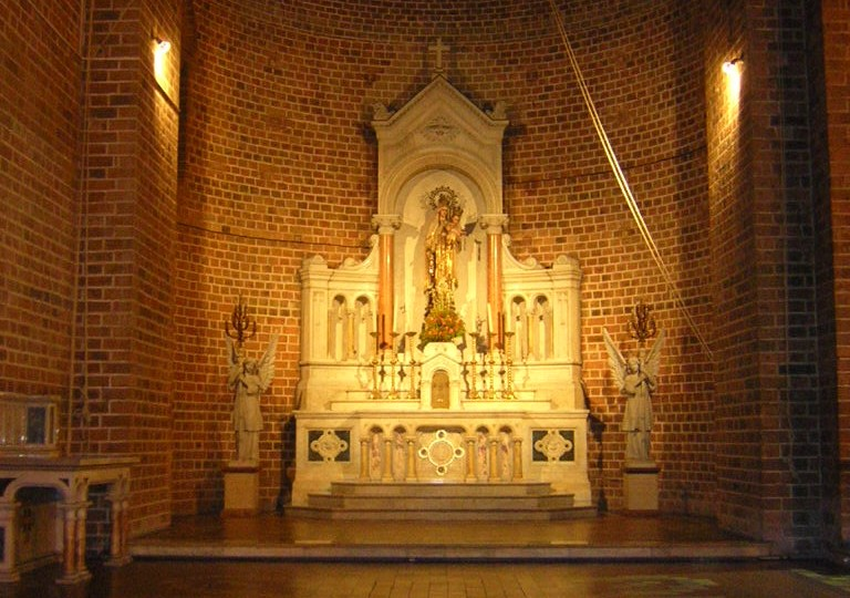 Retablo de la Virgen del Carmen, ubicado en el ábside occidental, de la Catedral Metropolitana de Medellín, Colombia